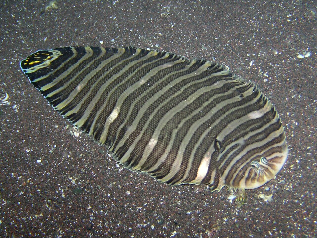 シマウシノシタ Zebrias zebra